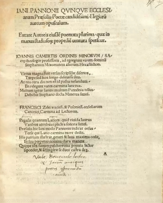 Ianus Pannonius _Elegiae_ 1514 page 1